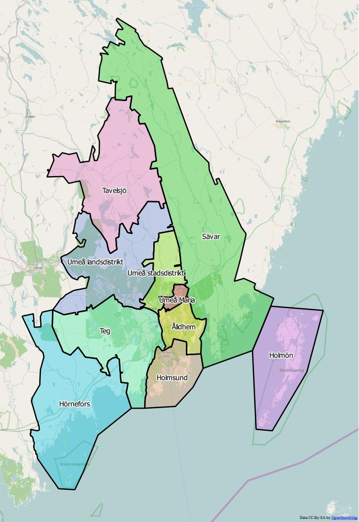 Distriktsindelningen i Umeå kommun World file: 254.70507444162012689 0 0 -254.70507444162012689 2179948.87807725323364139 9459479.66438029706478119